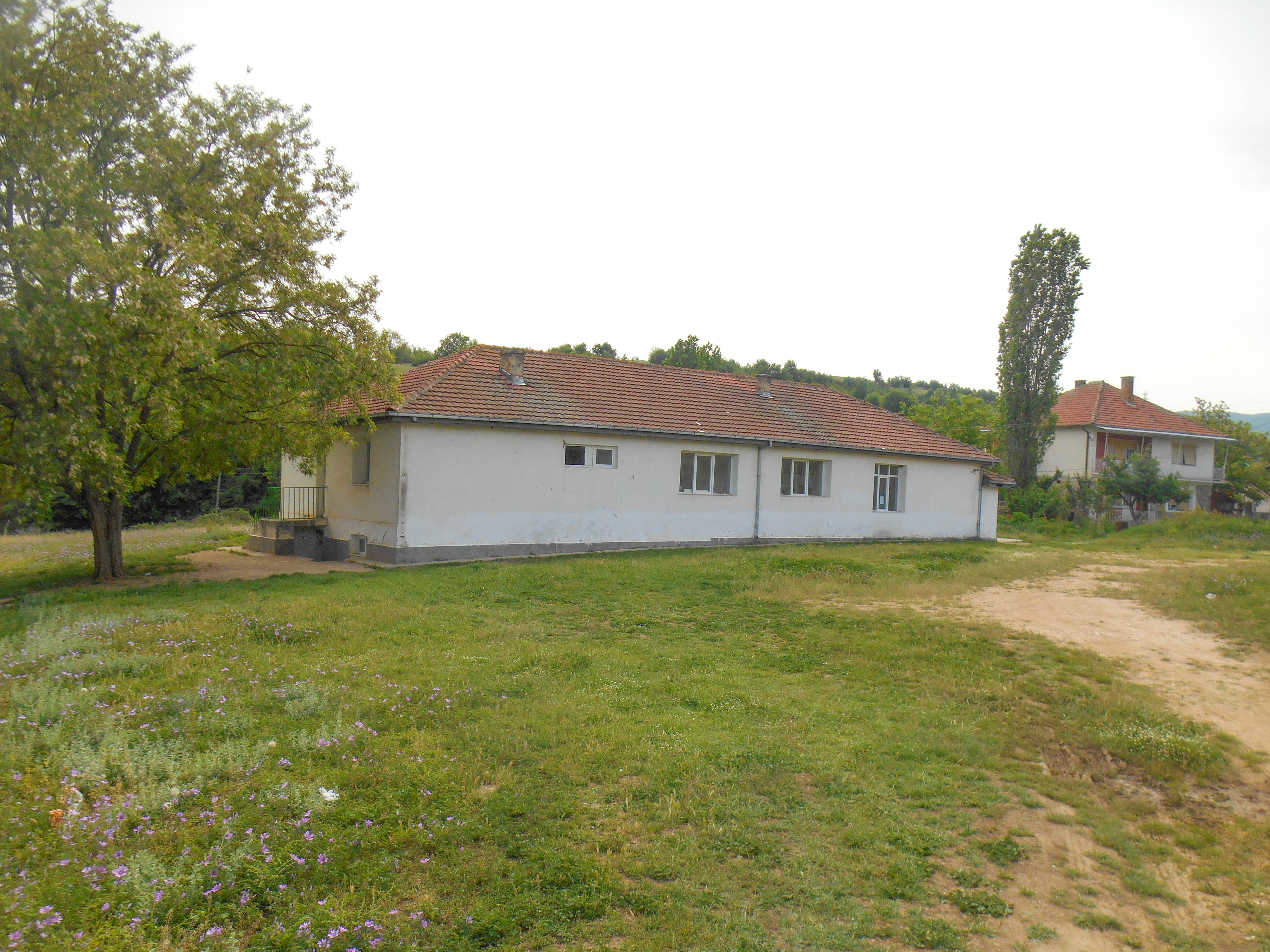 Основно училиште „Гоце Делчев“ - Владиевци